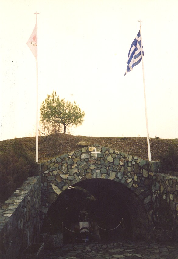 Tumba de makarios. Troodos. Chipre. Imagen tomada por el cargador. Año 1998.